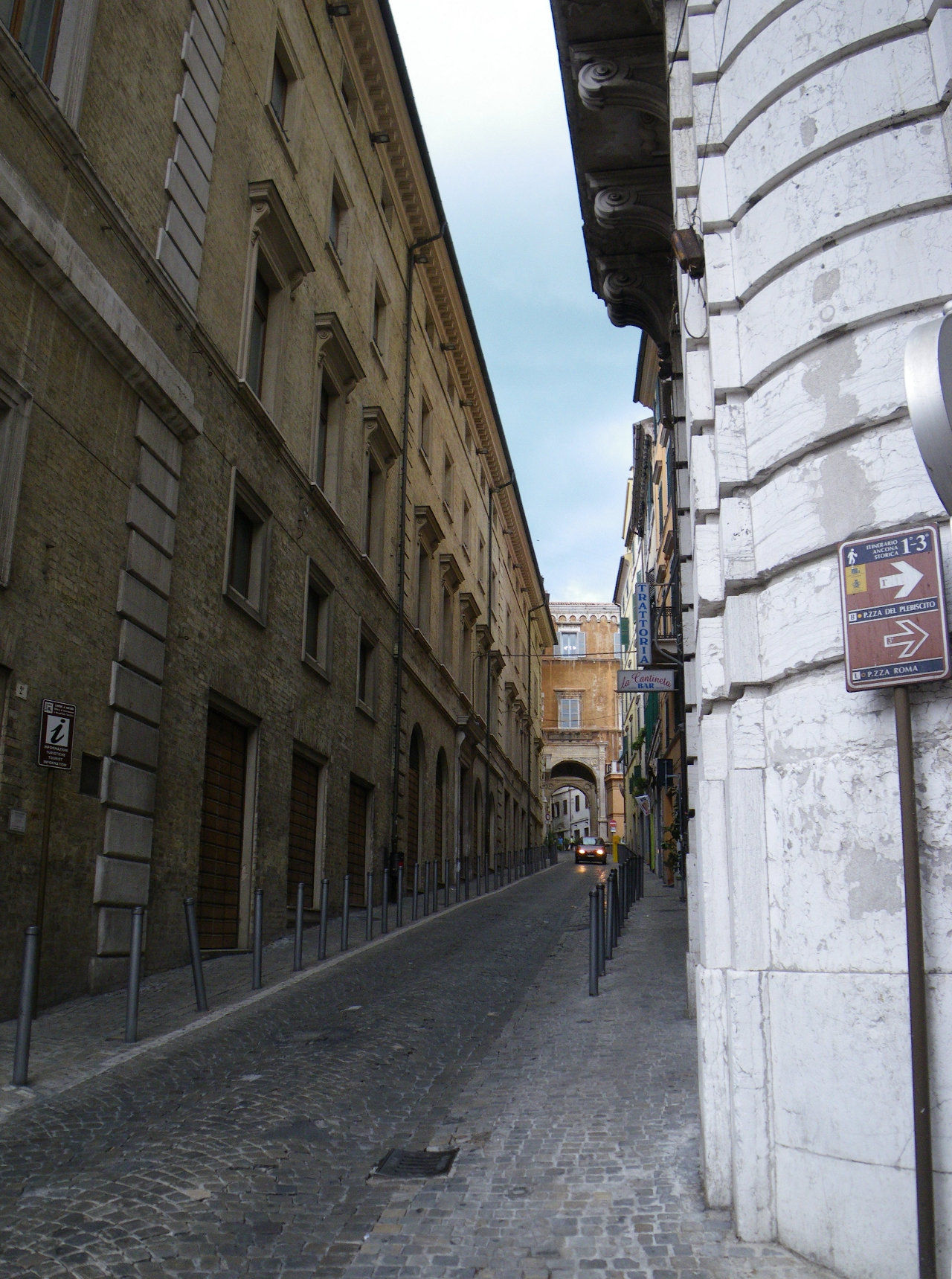 Ancona, via Gramsci, a fianco del Teatro delle Muse, verso Piazza del Plebiscito.